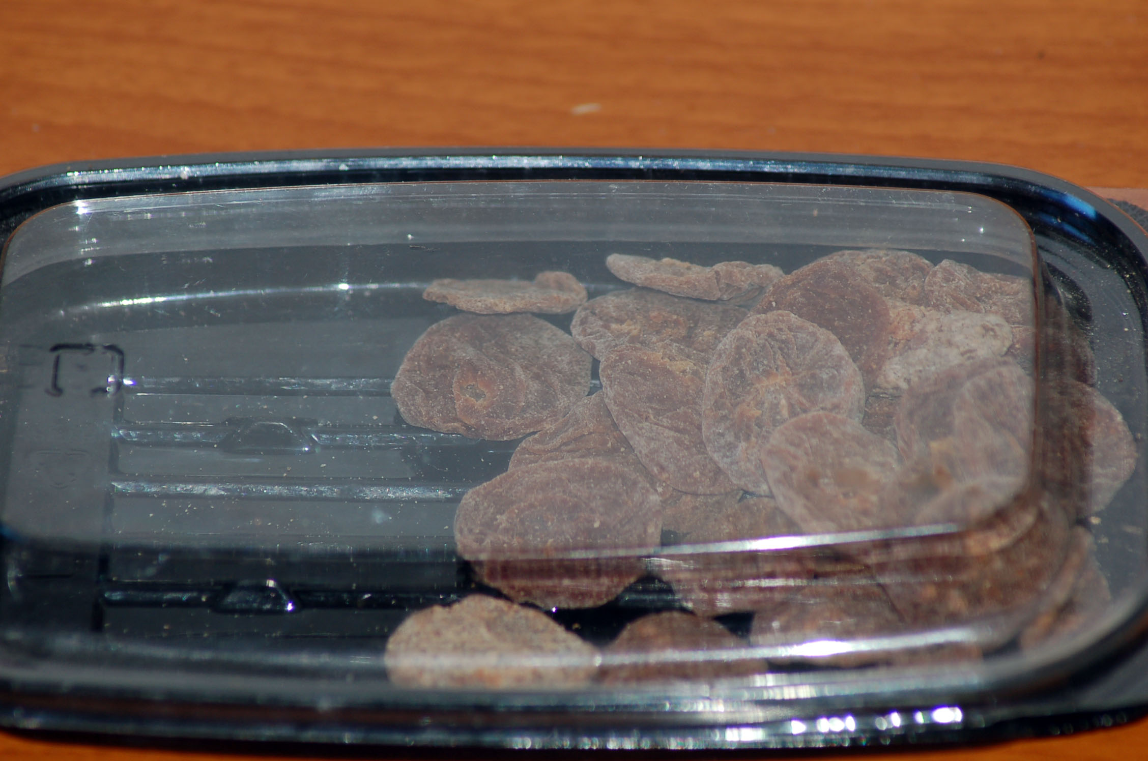 由作者在家中自行拍攝其圖象，版權幷不屬于任何人或機構，僅被貢獻在維基百科的條目中，以便進一步推廣和普及知識，幷且該項食品的商標已經被去掉，並不會涉及到侵犯任何個人或者組織機構的知識版權。